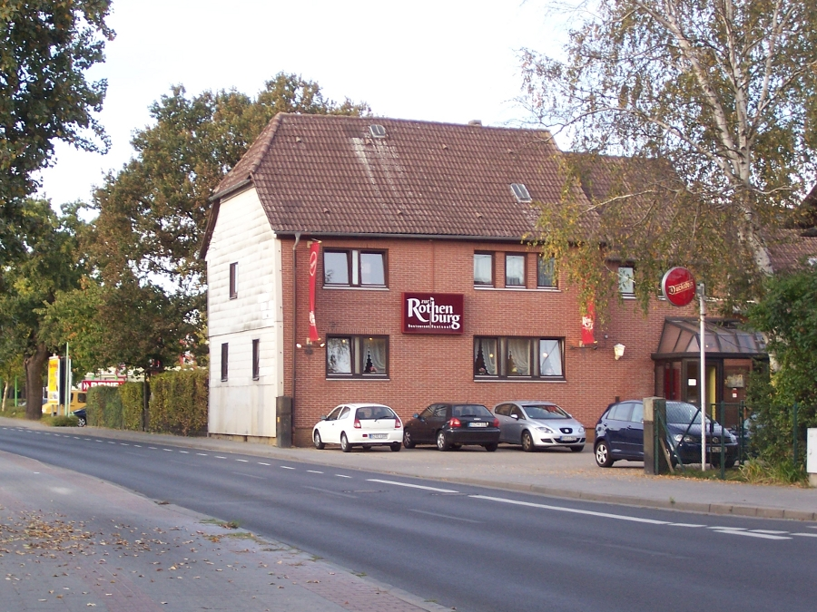 Die Rothenburg in Braunschweig-Weststadt